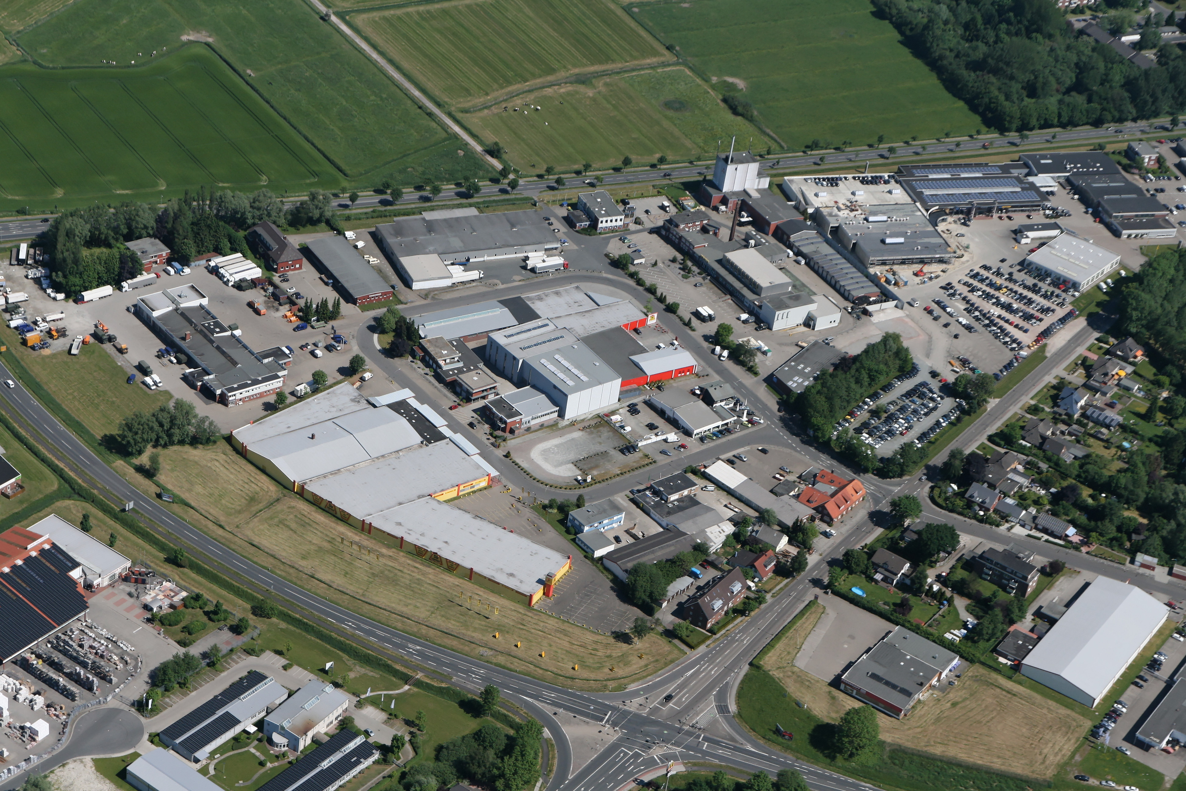 Luftaufnahme eines Gewerbegebiets im Wilhelmshavener Stadtteil Ebkeriege, im Vordergrund links die Peterstraße und rechts die Straße Ebkeriege, im Hintergrund die Oldenburger Straße.